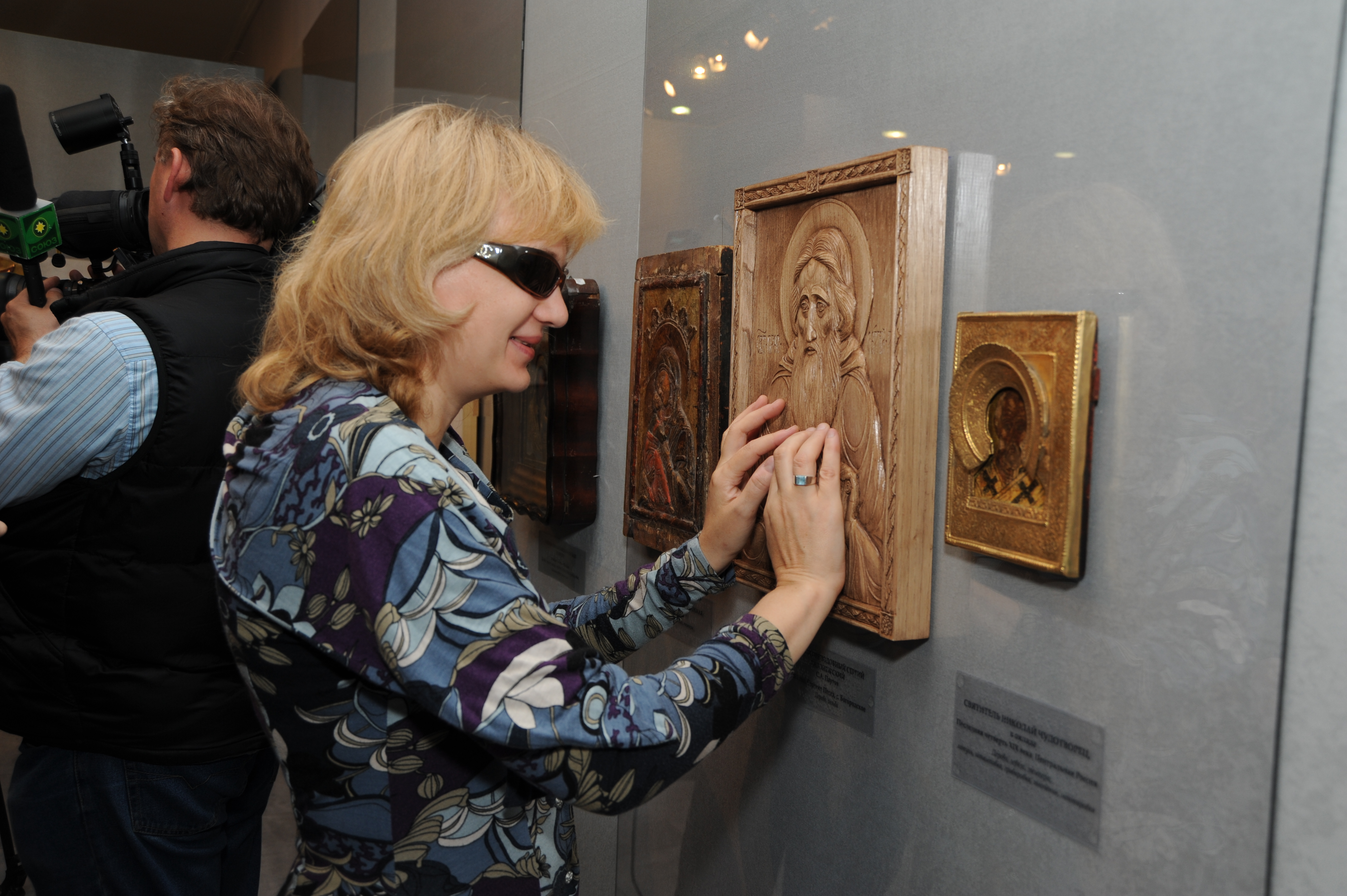 Музей "Дом Иконы и Живописи имени С.П. Рябушинского" стал первым в Москве музеем с постоянной тактильной экспозицией для незрячих и слабовидящих посетителей.